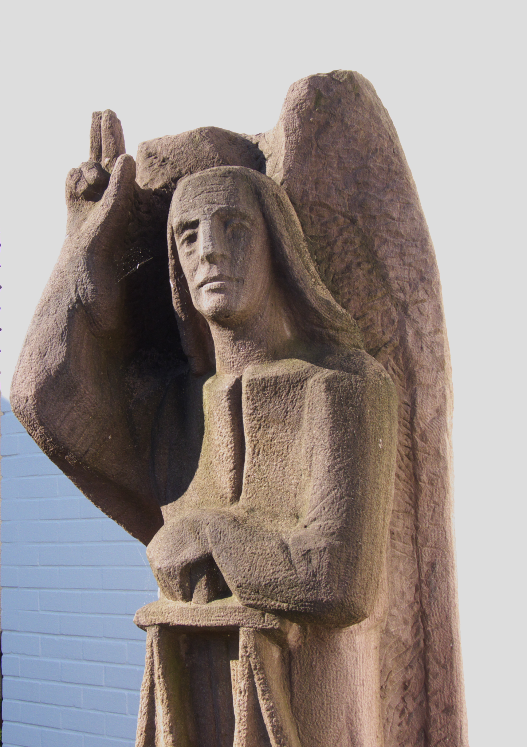 St. Michael, Skulptur von Joseph Krautwald, 1987, Katholische Kirche St. Michael in Bünde-Holsen, Detail.